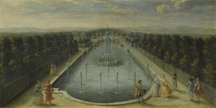 Le bosquet de l'Île Royale